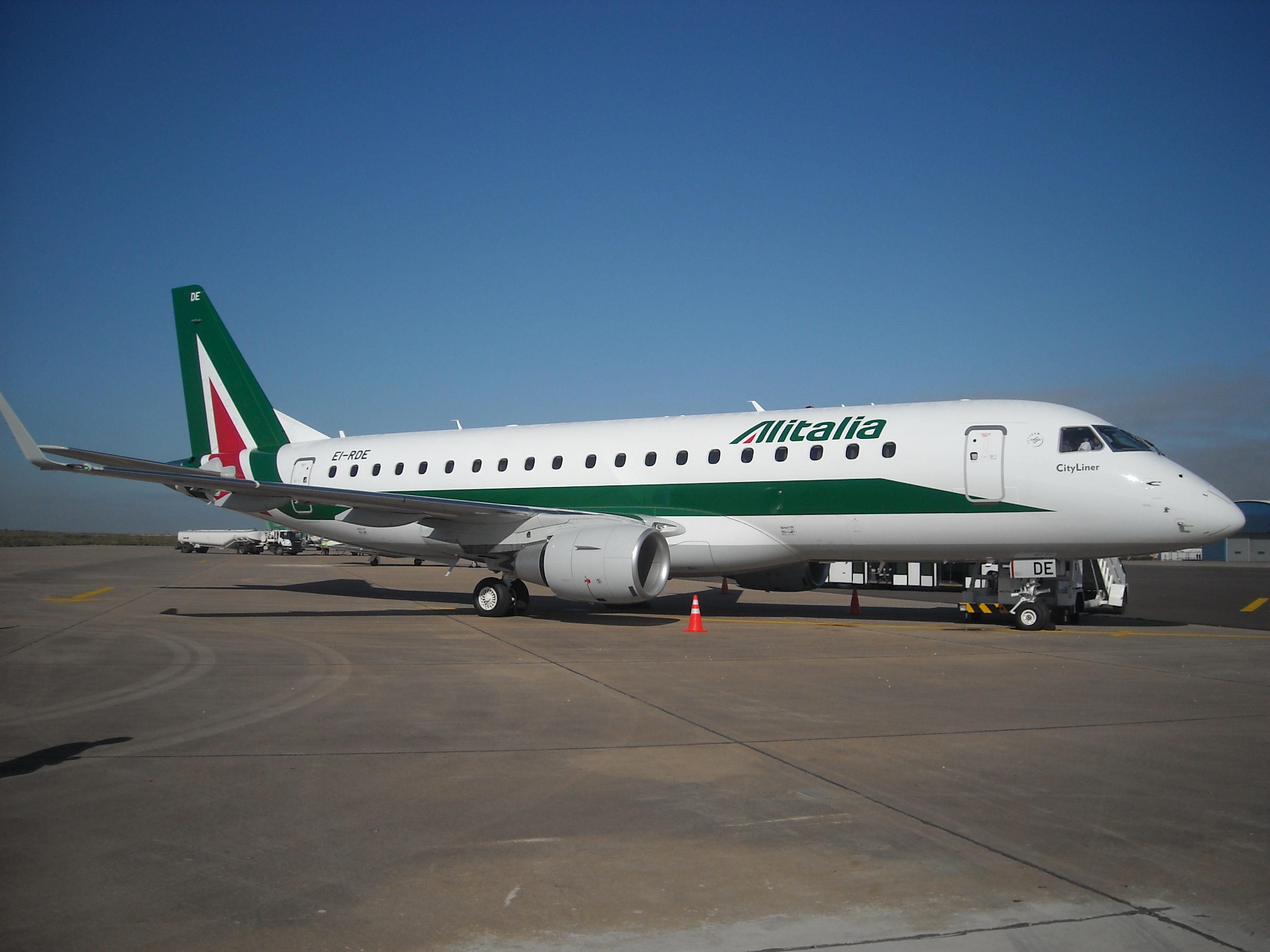 E-175 a Casablanca